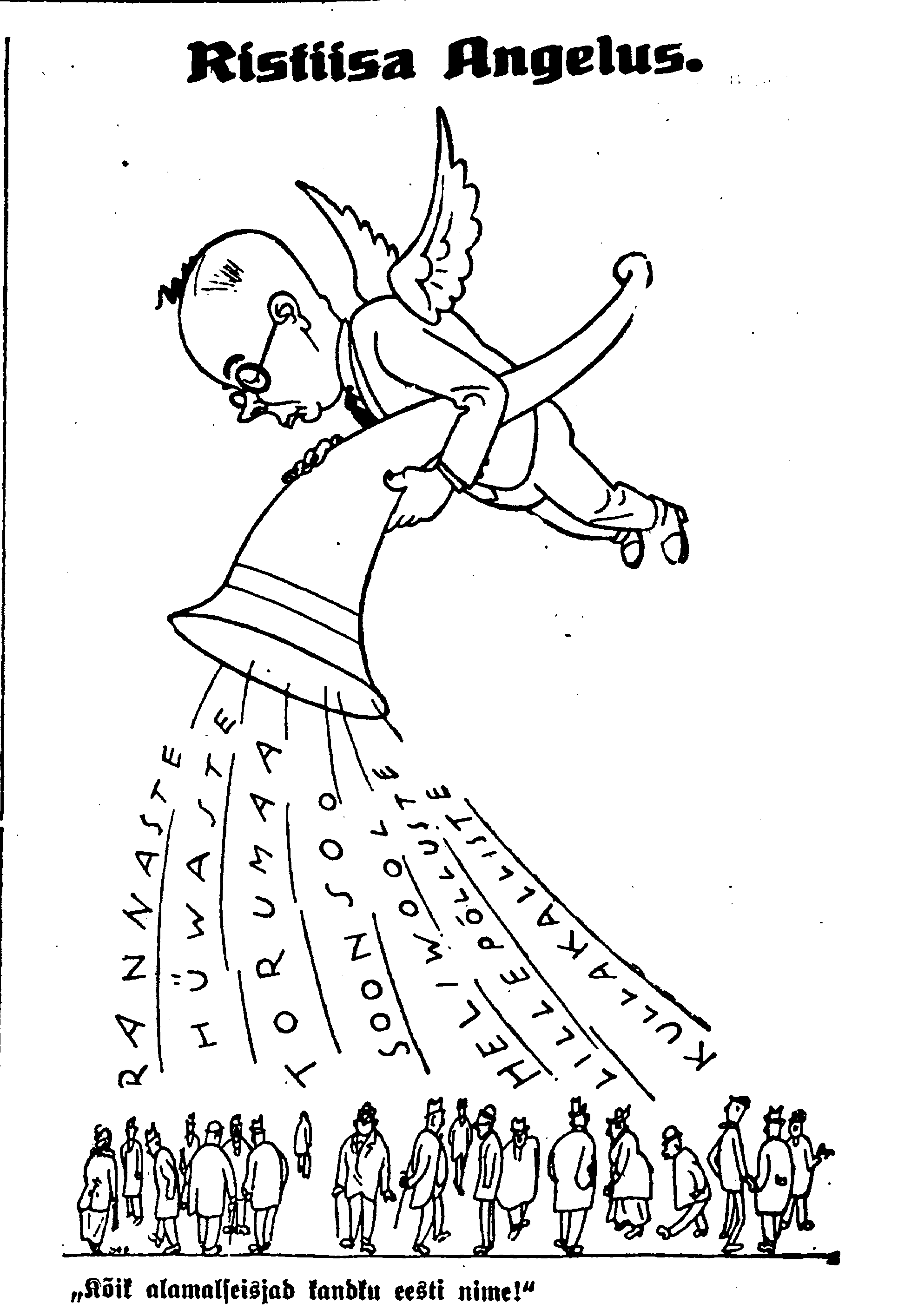 Ristiisa Angelus